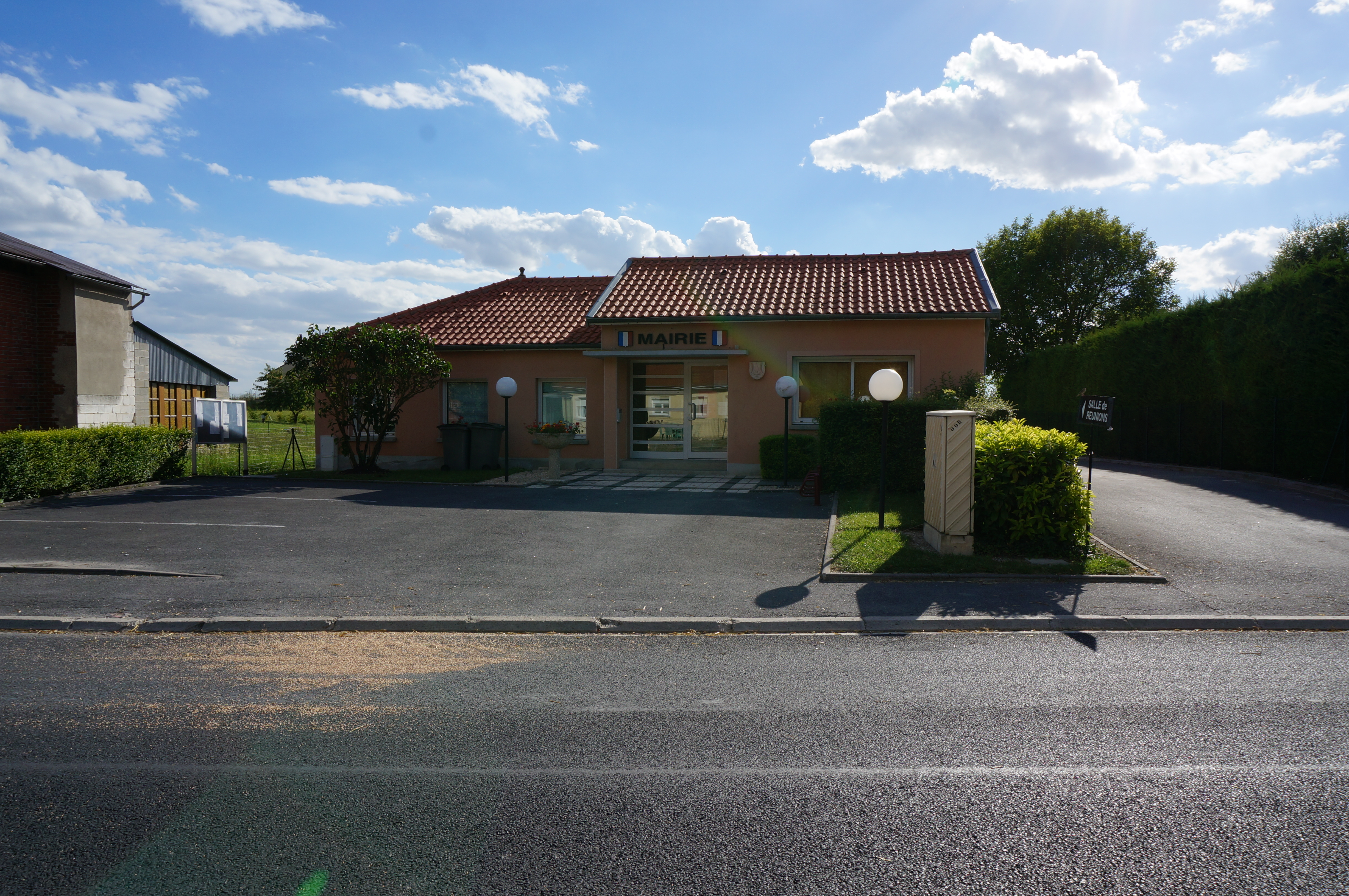 église Saint-Paul de Dampierre-au-Temple.